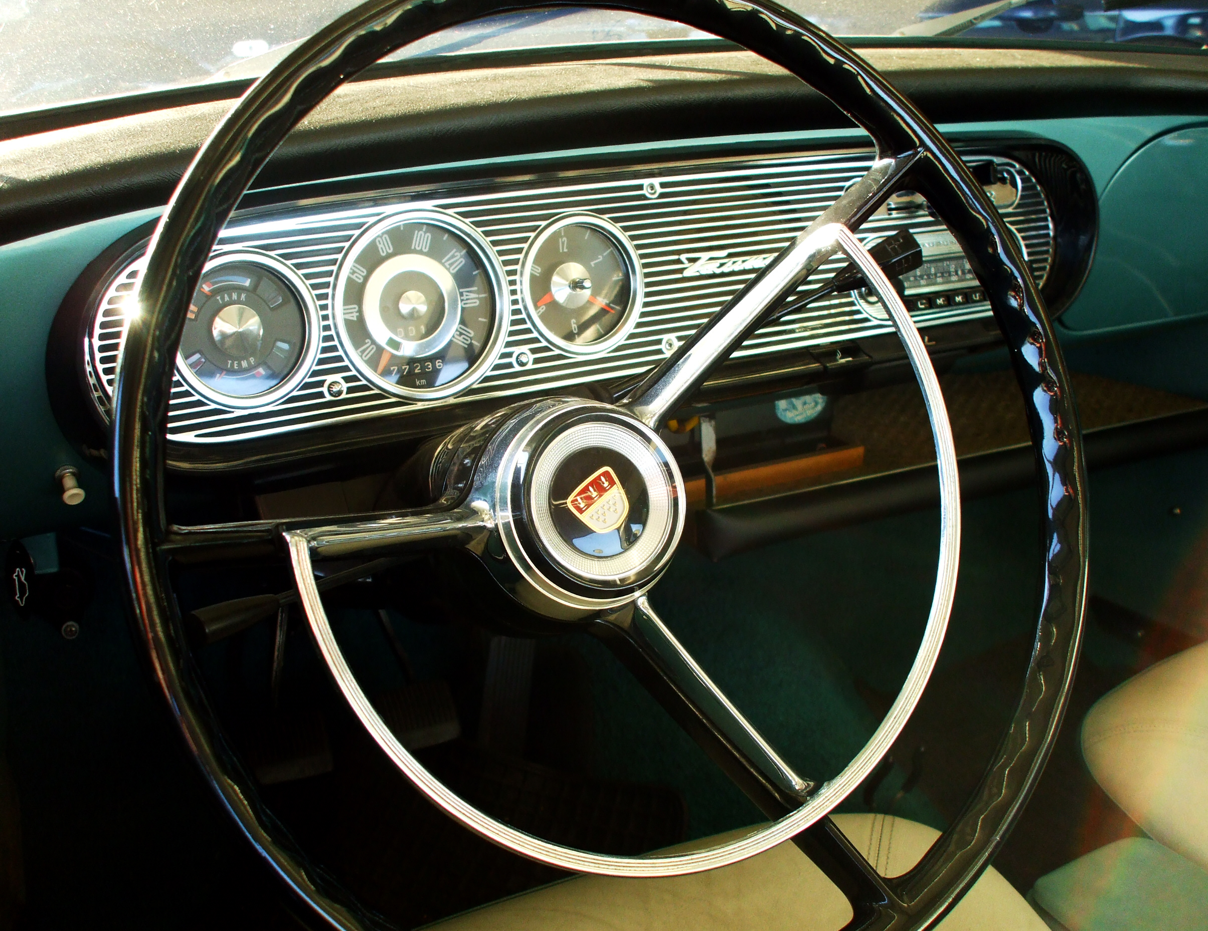 Armaturenbrett FORD 17M TS, Baujahr 1962.